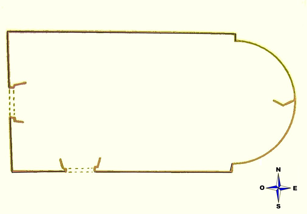 Plànol de l'església de Sant Serni del Grau, a Vilamantells (Guixers). El plànol ha estat extret del llibre Esglésies romàniques del Solsonès.